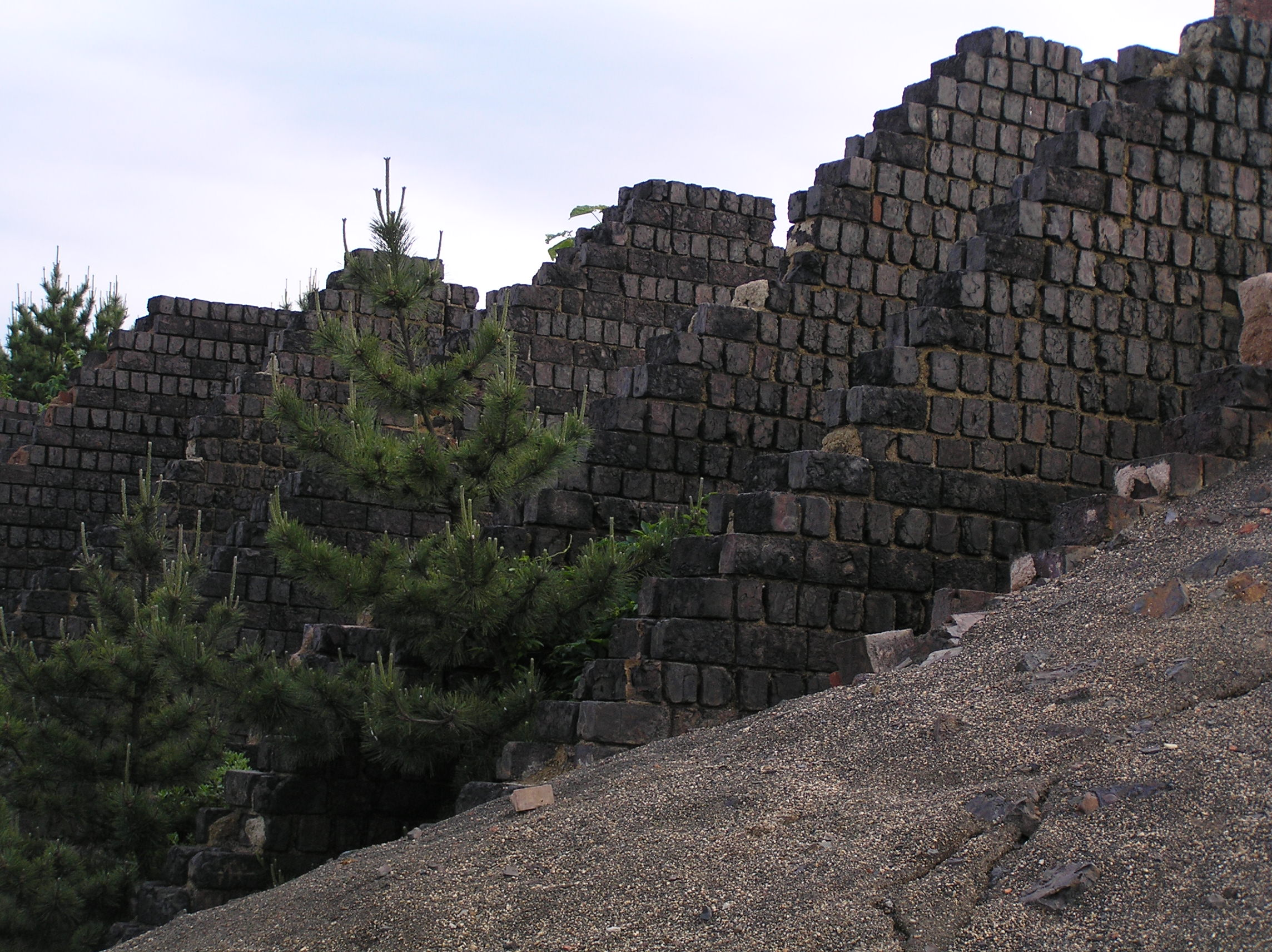 2004-05-22 Inujima,犬島